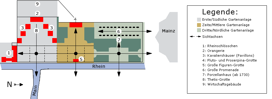 "Übersichtsplan Lustschloss Favorite Mainz